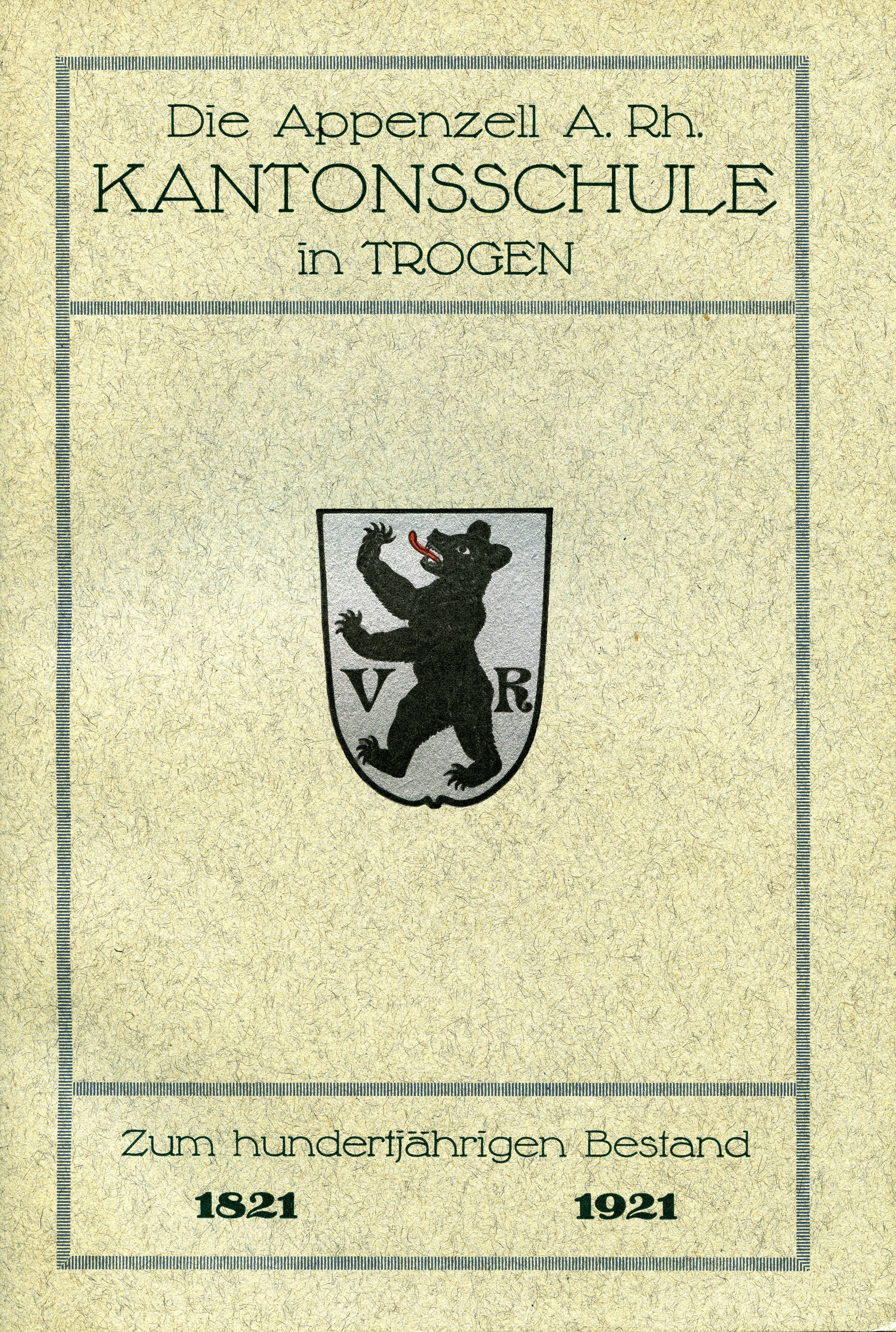 Festschrift von Ernst Wildi: "Die Appenzell a. Rh. Kantonsschule in Trogen zum hundertjährigen Bestand." Eigenverlag, Trogen 1921.